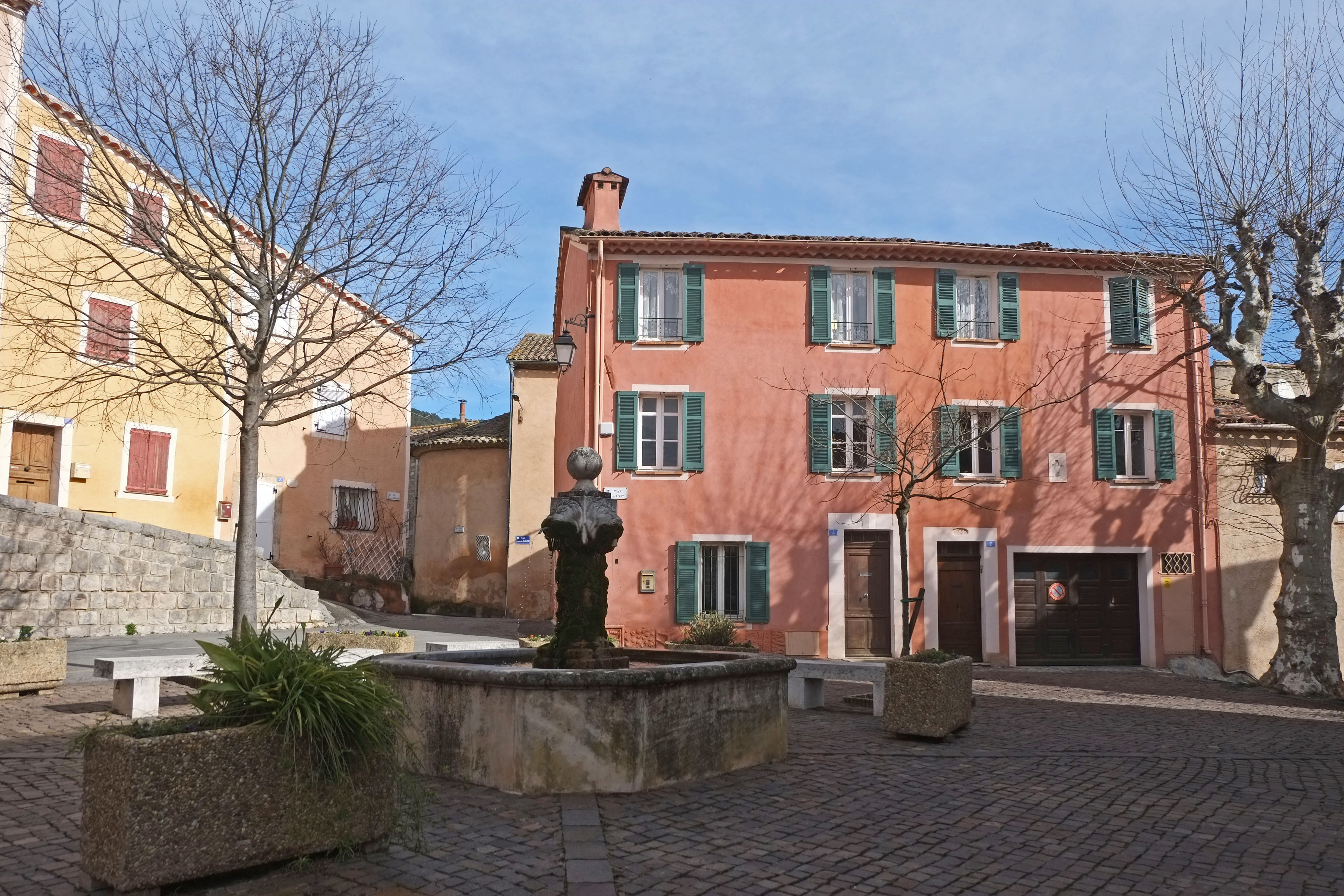 La place Gervais Court de Peymeinade